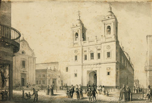 a mediados del siglo XIX. A su izquierda, la Capilla de San Roque. Este era su aspecto neoclásico previo a la reforma del año 1914 a cargo del arquitecto Carlos Nordmann.